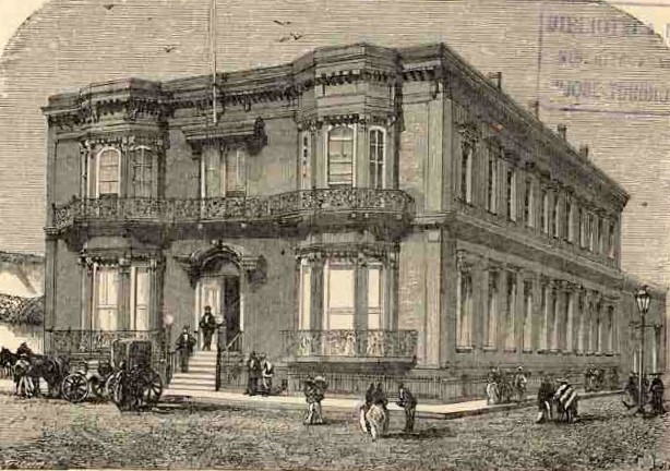 Santiago - Casa de D. Enrique Meiggs (1872)